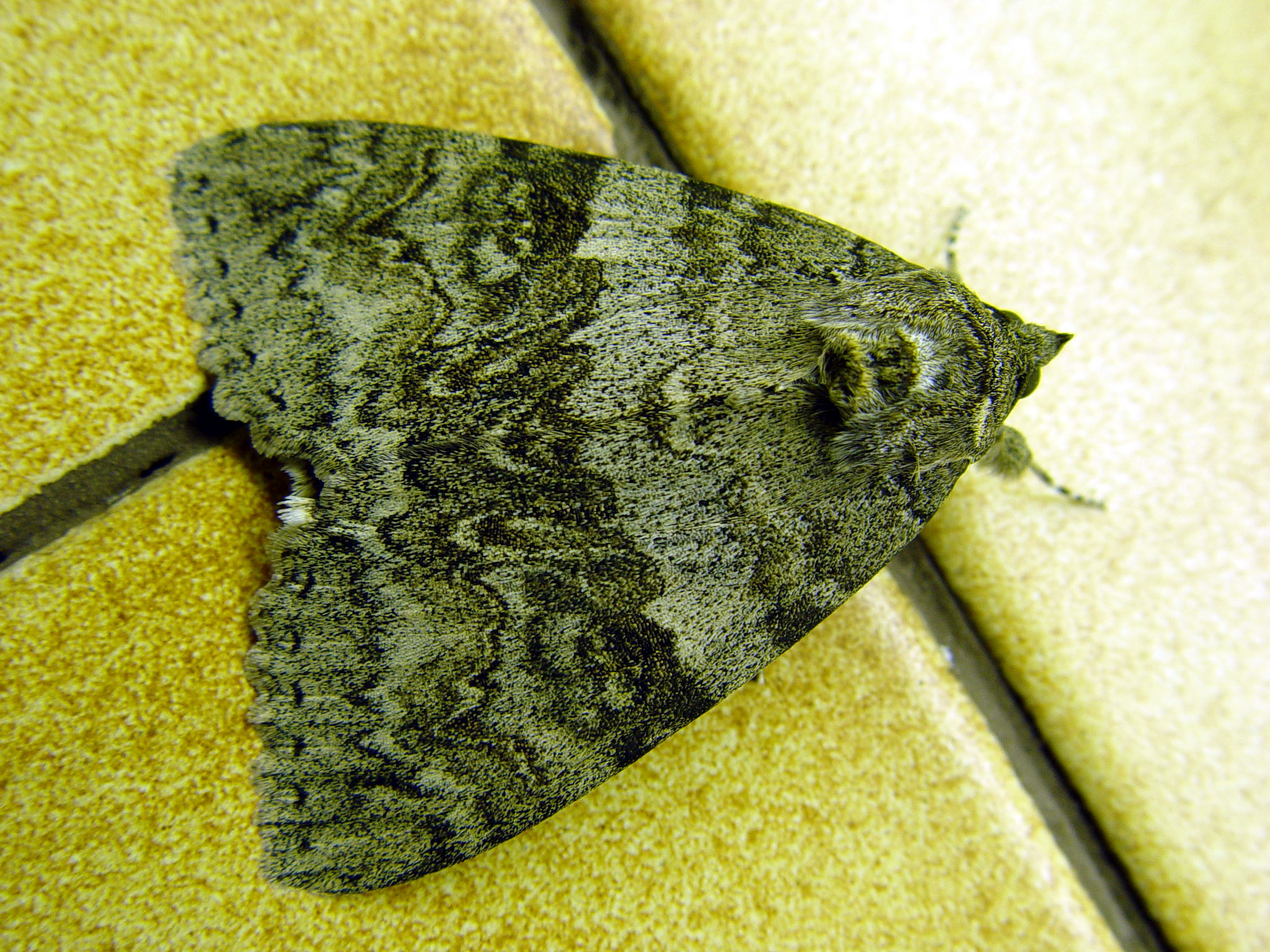 Catocala nupta (Linnaeus, 1767)